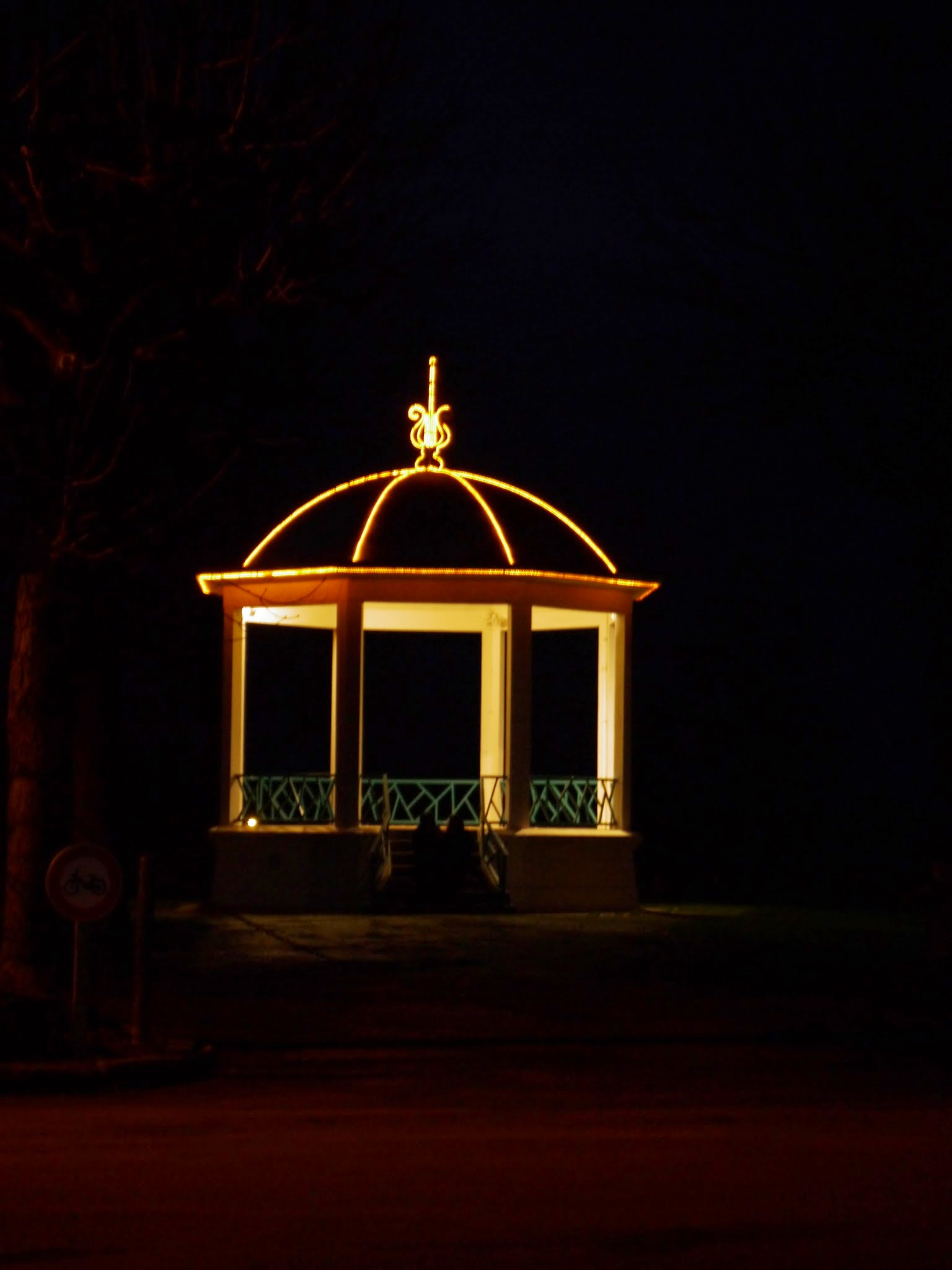 Le kiosque illuminé pour les fêtes de Noël